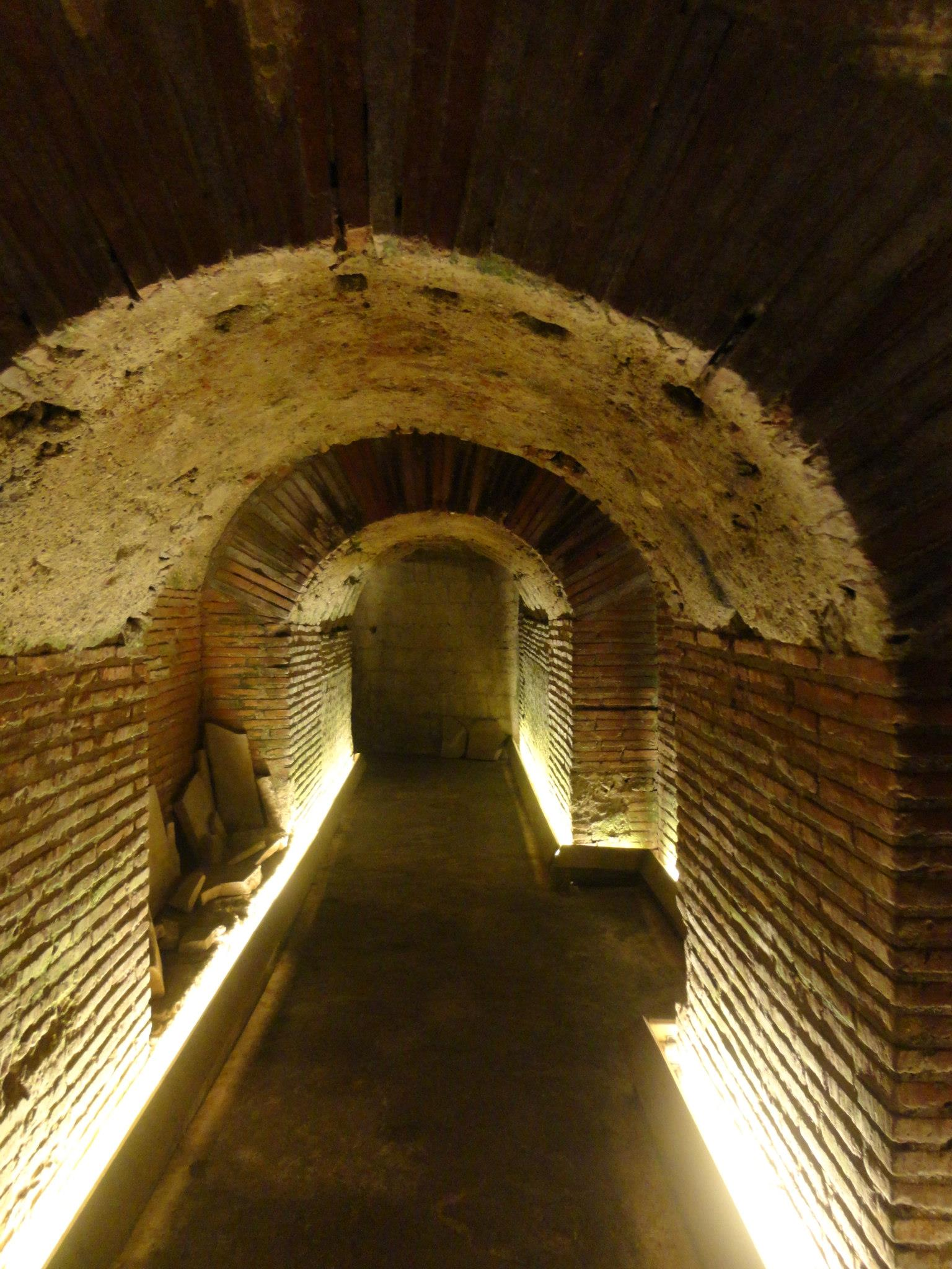 Cavea mediana del Teatro Neroniano di Napoli